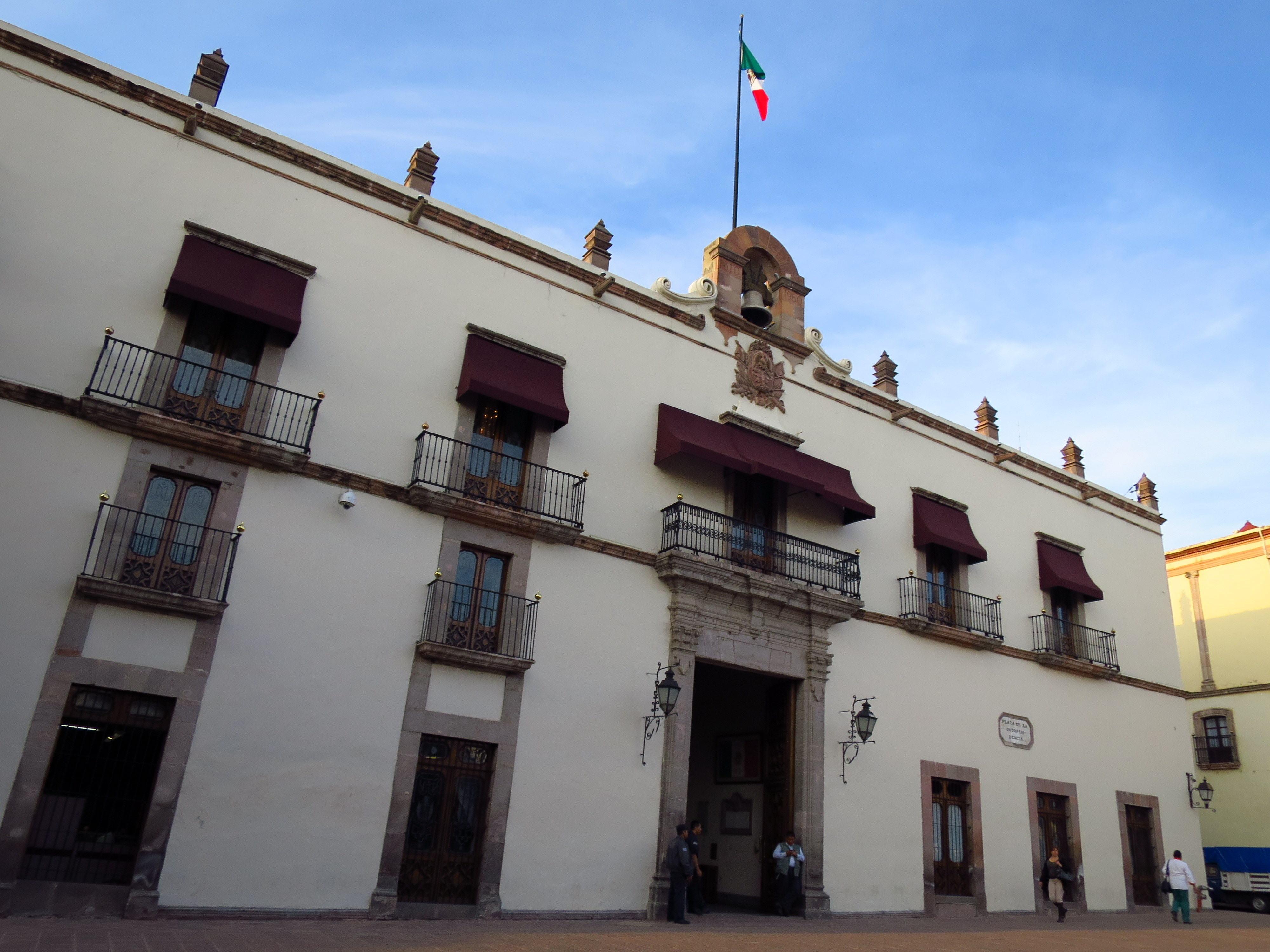 Santiago de Querétaro Centro Historico